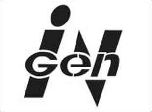 Logotipo da empresa fictícia Ingen Technologies, da série Jurassic Park